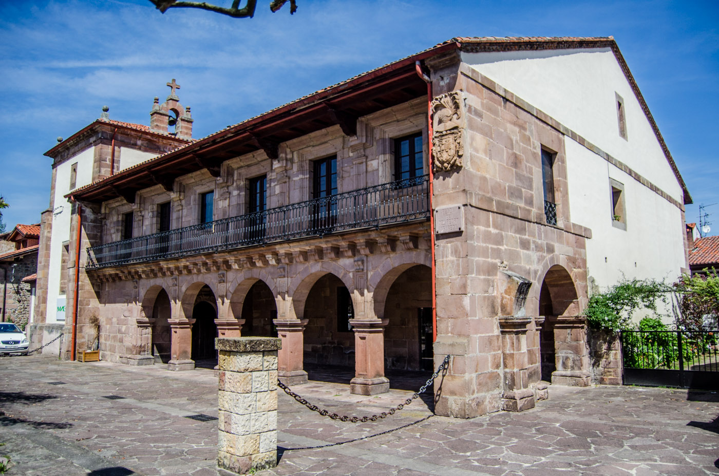 Palacio de Ygareda, o Gómez de la Torre, o Igareda y Balbás, o Casa-Palacio de los Haces. Carrejo. España. Declarada Monumento Histórico Artístico el 20 de diciembre de 1984. Actualmente este edificio es el "Museo Regional de la Naturaleza".